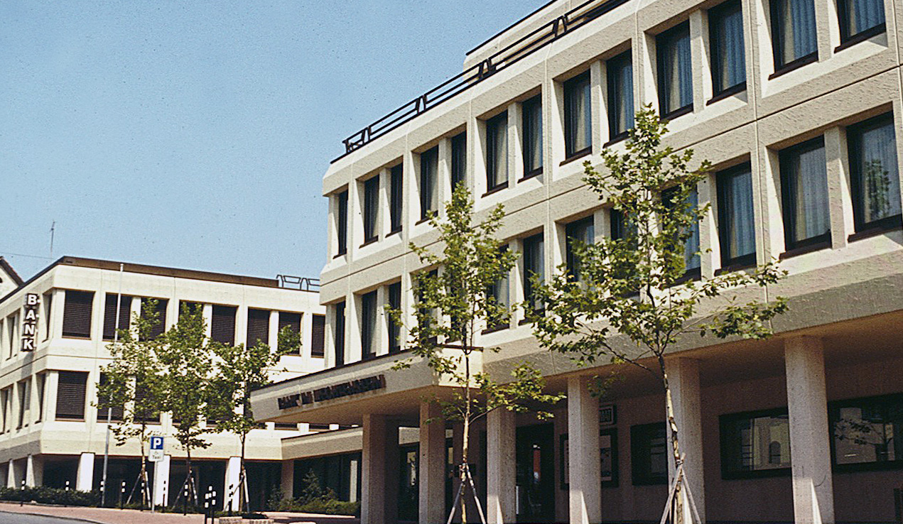 Bank in Liechtenstein, Head Office, Vaduz, Liechtenstein